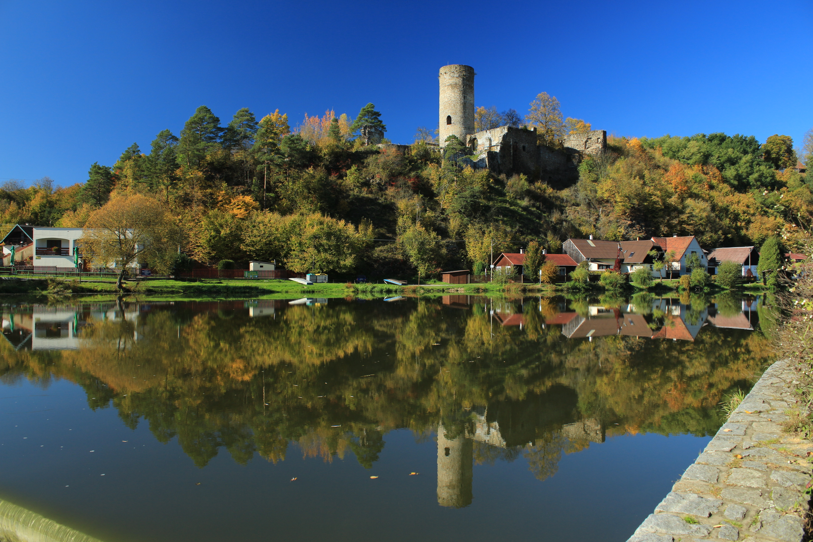 Hrad Dobronice a Lužnice